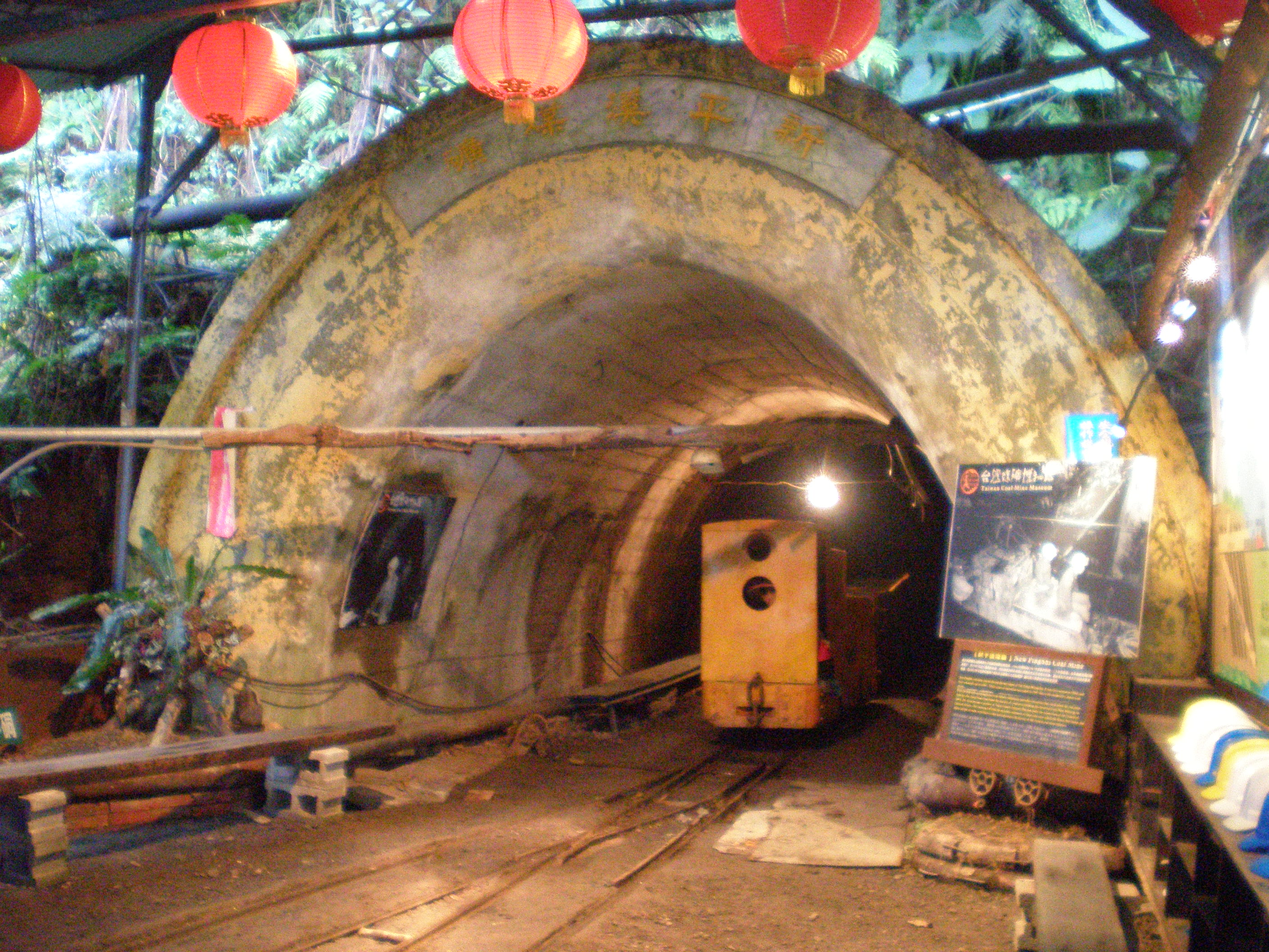 新平溪煤礦（今台灣煤礦博物館）坑口。